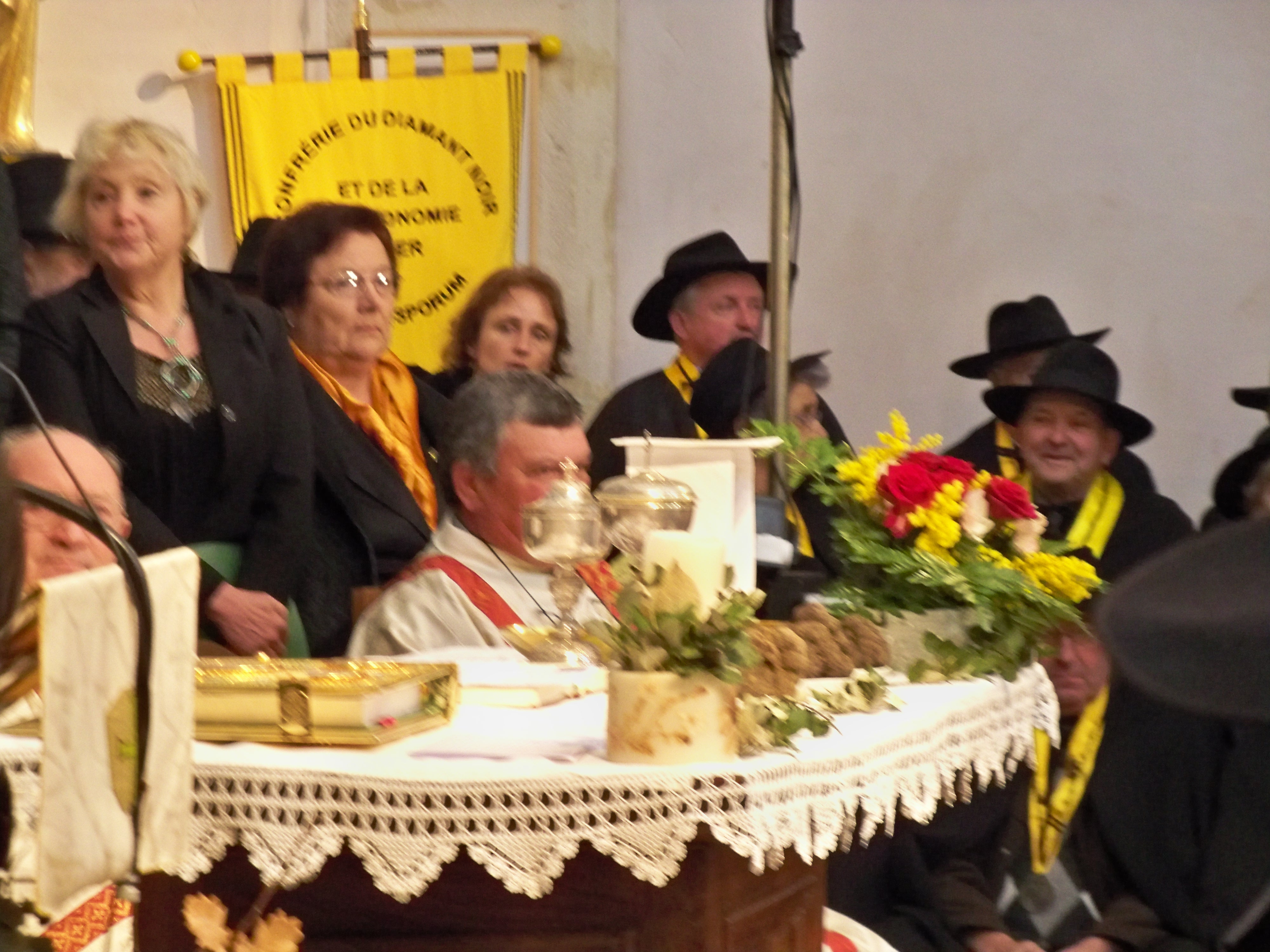 Messe aux truffes à Richerenches, Vaucluse, France